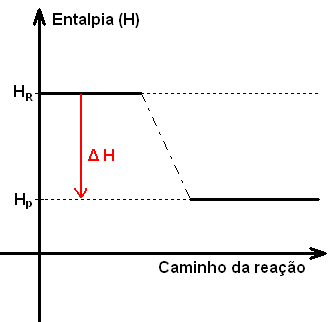 Entalpia r exotermica.